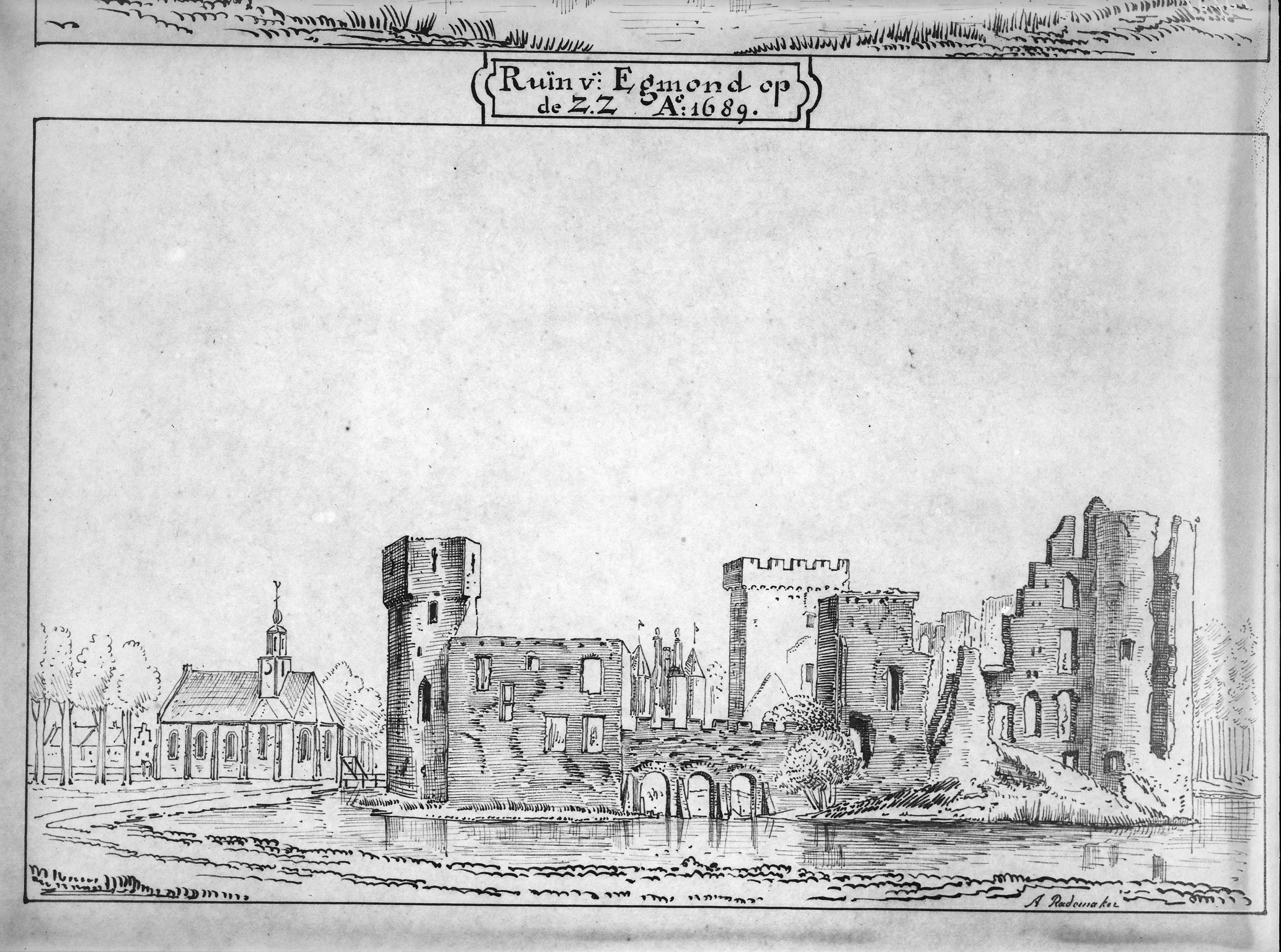 Kasteel: en ruïne naar copieen van oude tekening in de verzameling Rijksbureau Monumenten Zorg